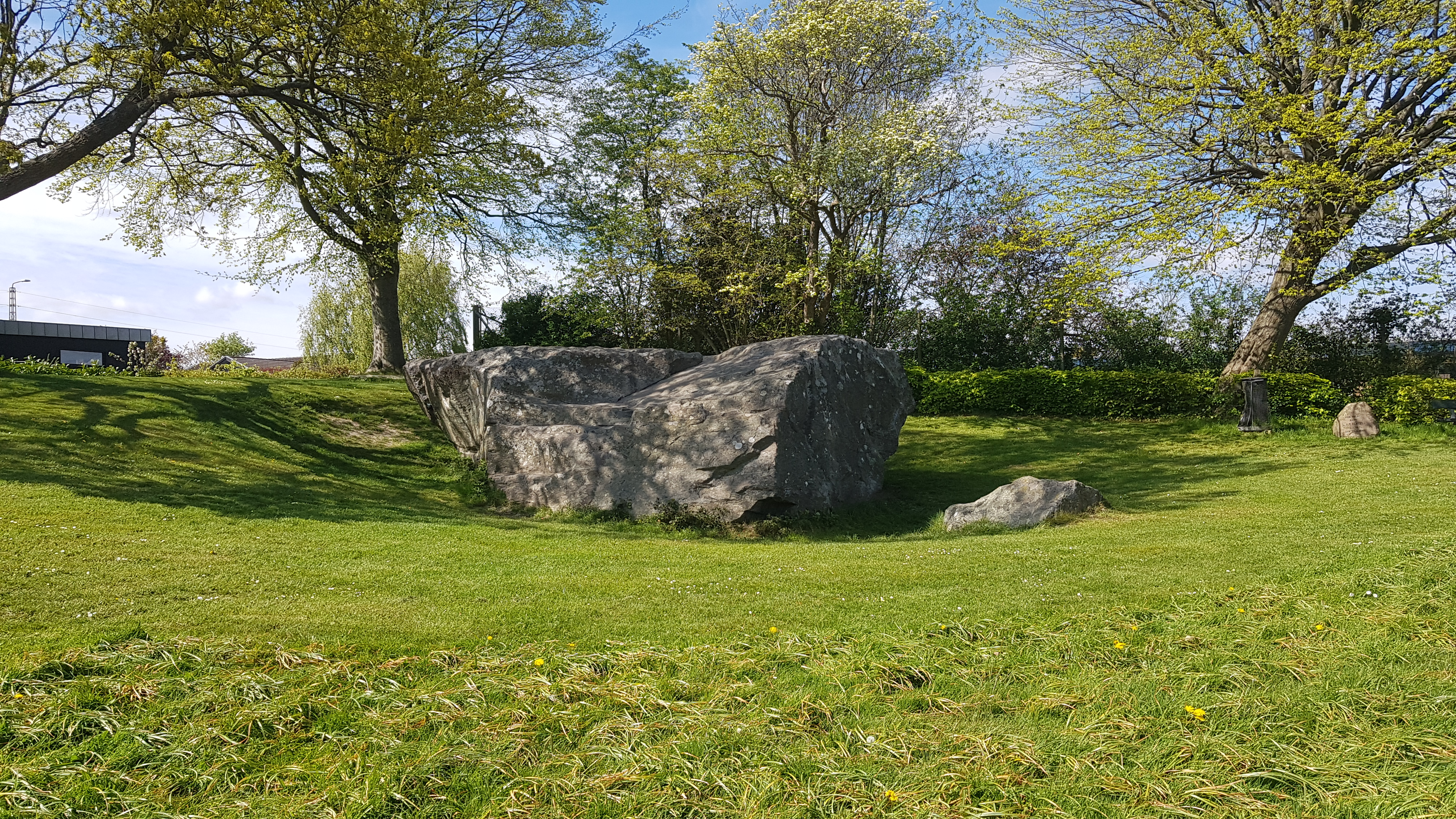 Dybbølstenen